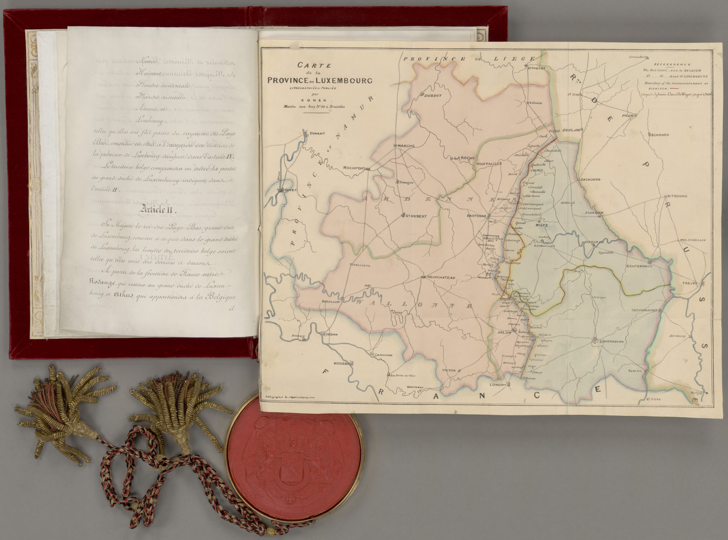 Scheidingsverdrag met België 19 april 1839